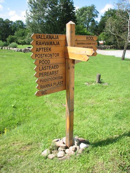 Teeviit Mustjalas